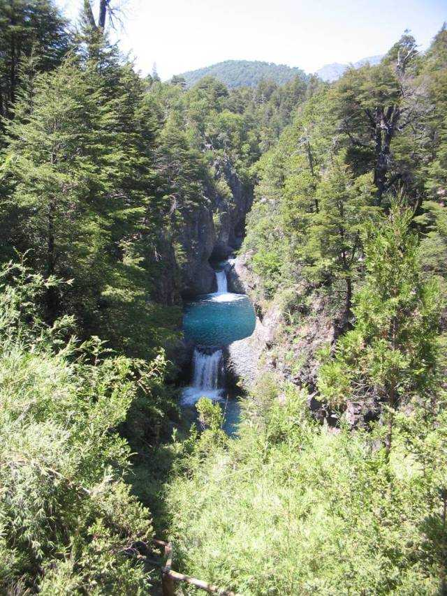 Increíble formación geológica con siete pozones de agua cristalina del río Claro con sus respectivas caídas de más de 3 metros de altura.